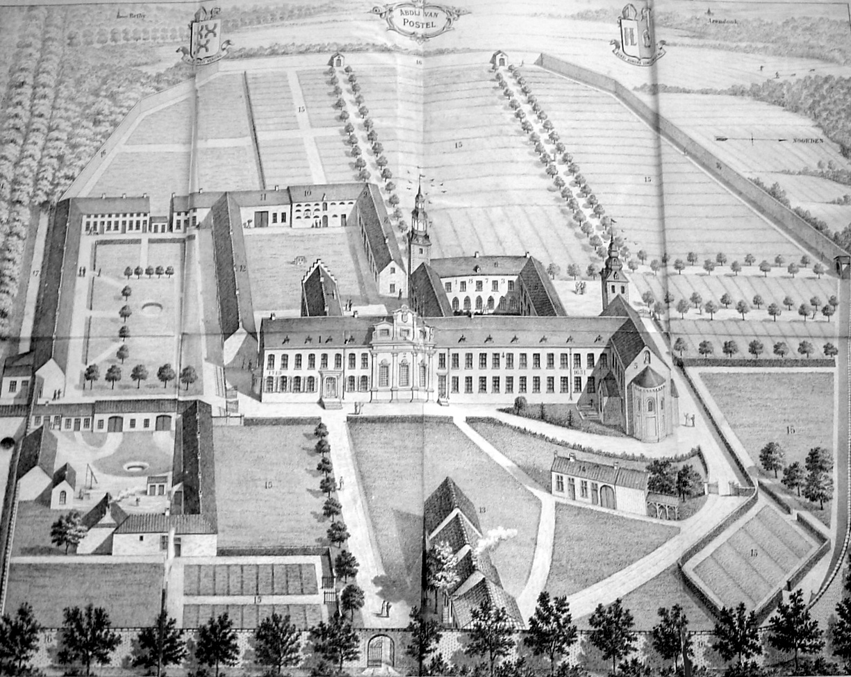 De abdij van Postel in de 19de eeuw.